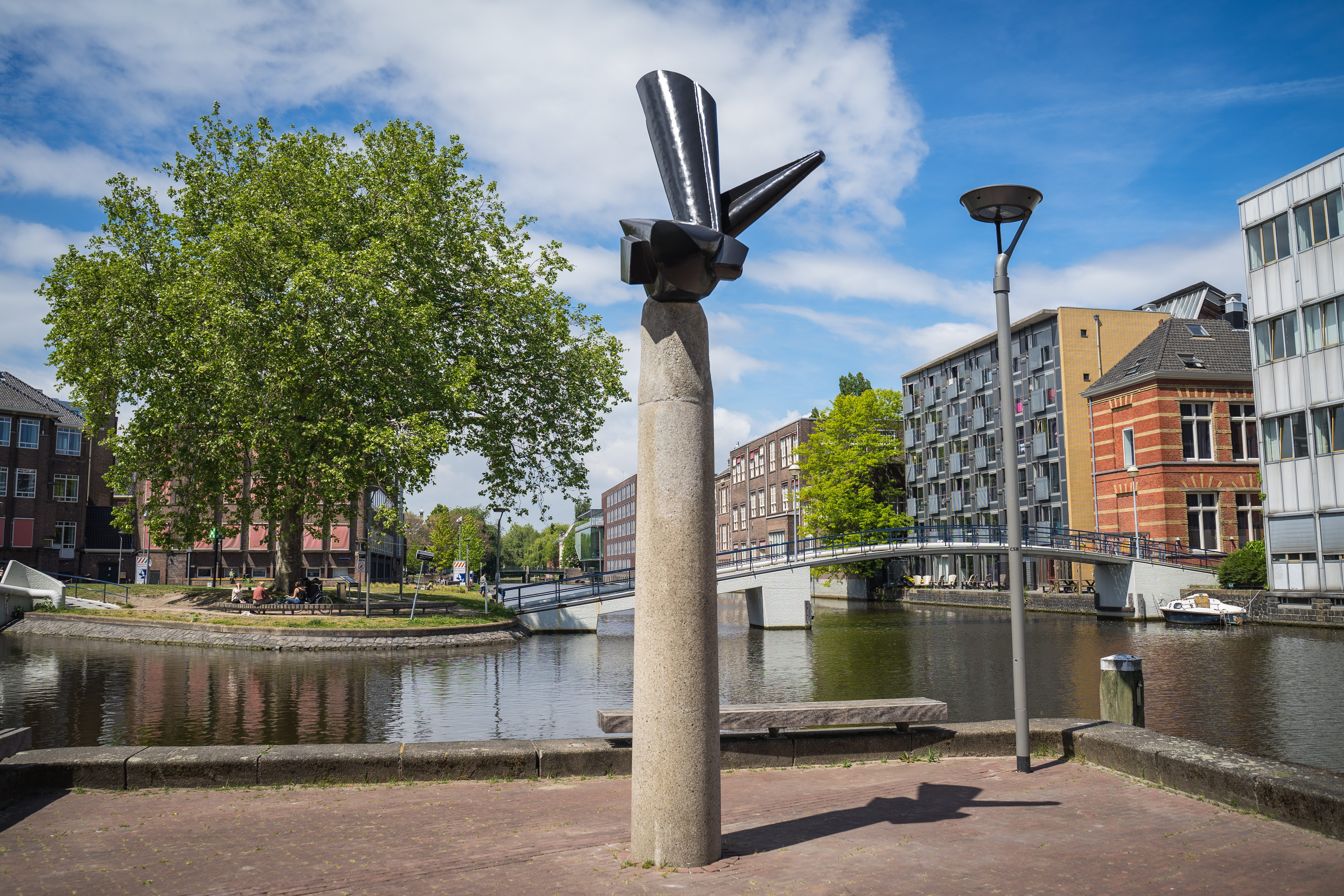 Vogel op pyloon (mei 2020) na renovatie, met op de achtergrond Roeterseiland